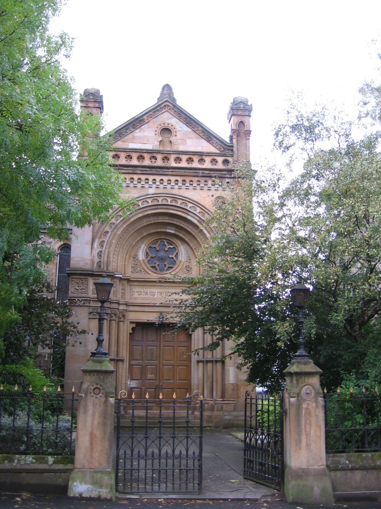 Garnethill synagogue in Glasgow, Scotland